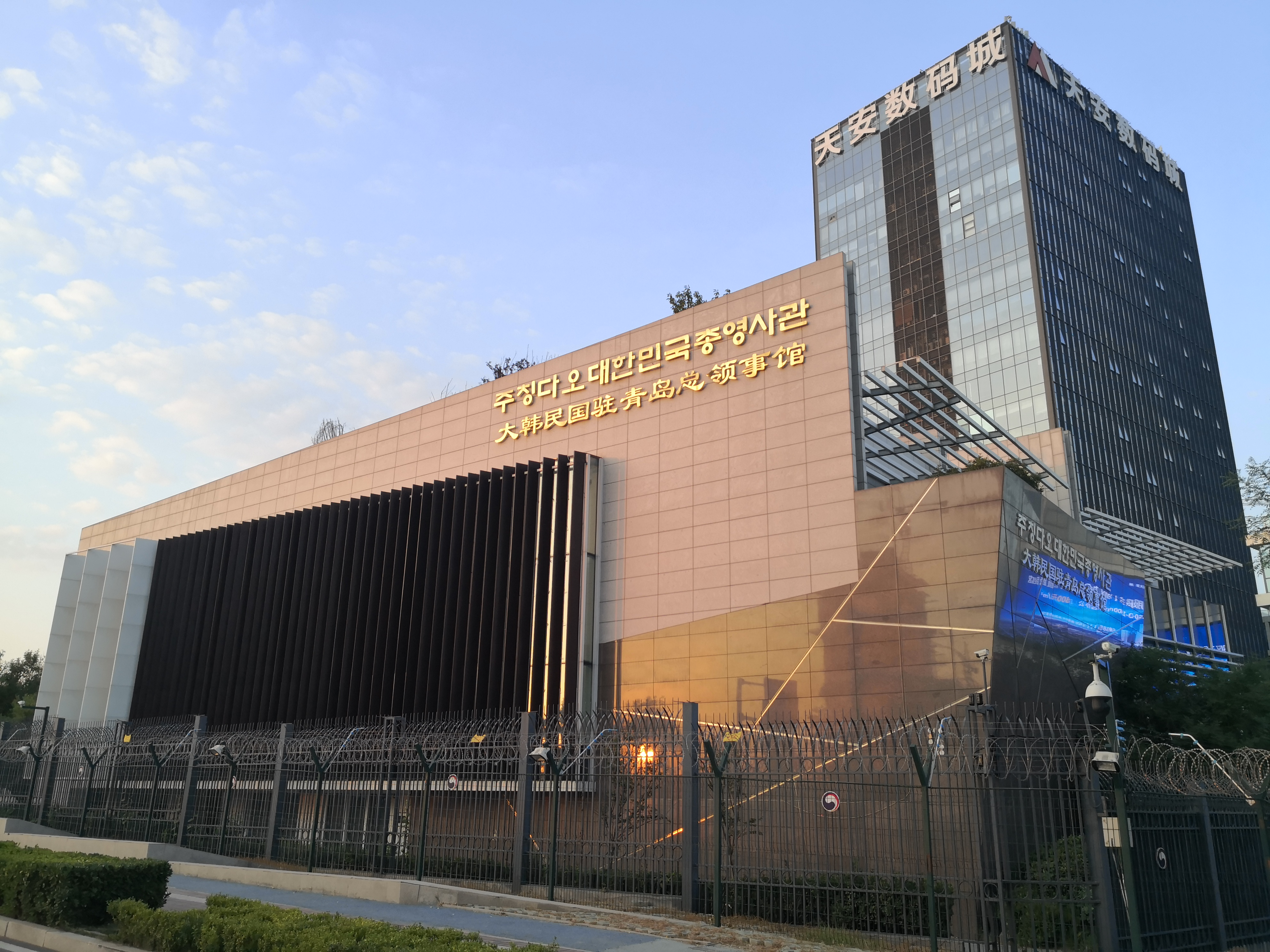 位于青岛市城阳区春阳路88号的韩国驻青岛总领事馆与天安数码城